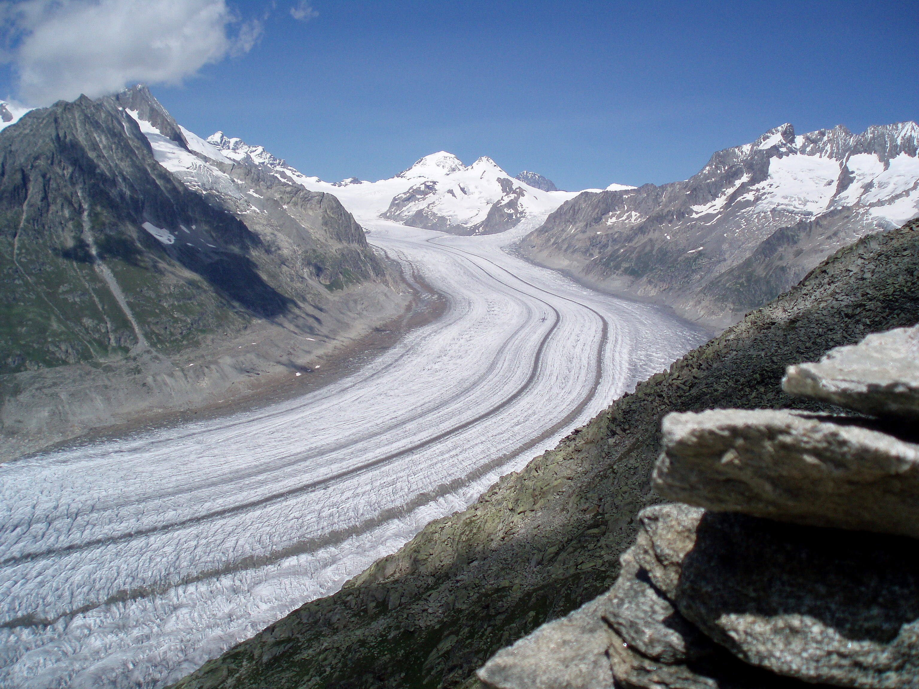 De Aletschgletsjer in de Alpen van Zwiserland. Gezien vanaf de Bettmerhorn.